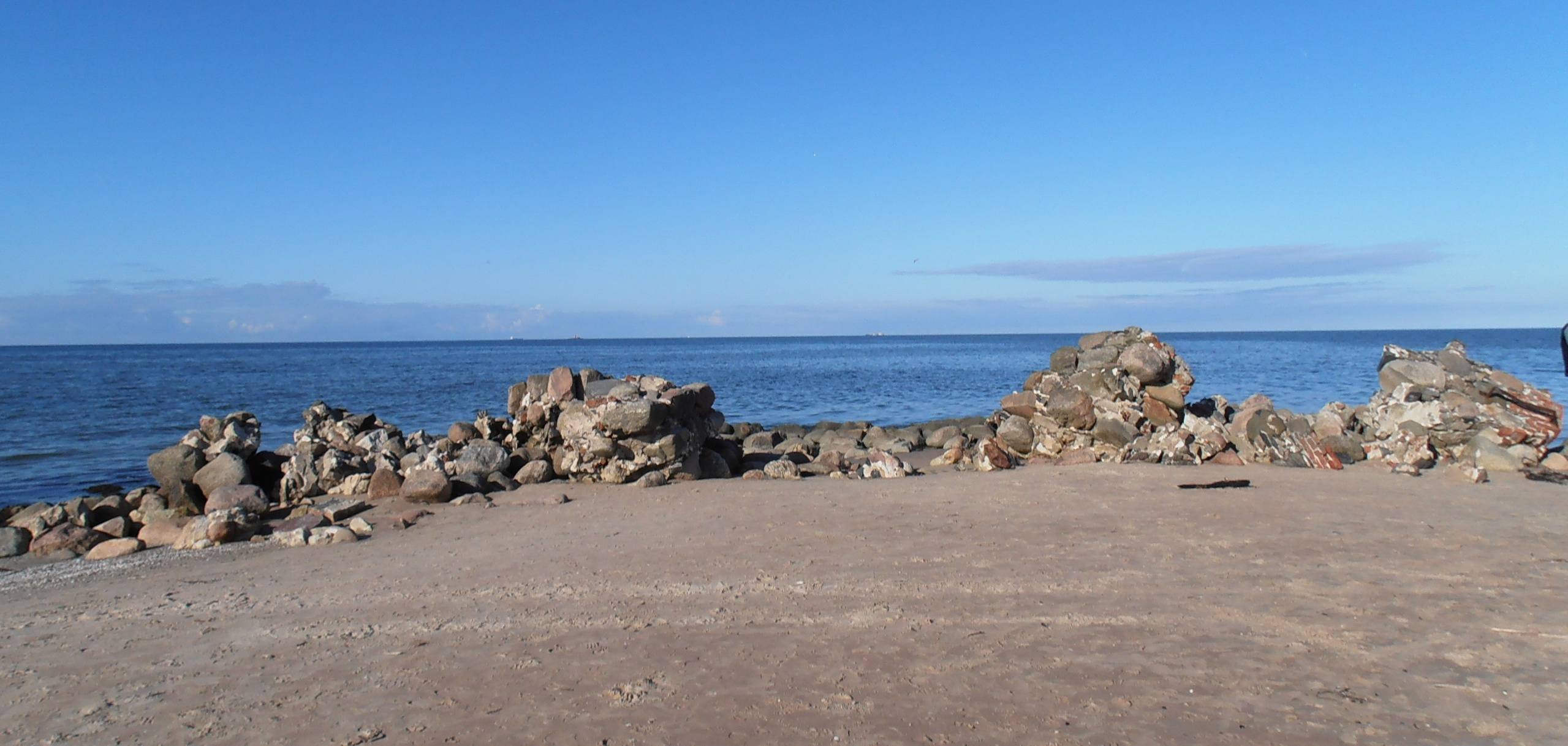 Landspitze Kolkas rags, in Vordergrund der eingestürzte Leuchtturm, im Hintergrund der Neue